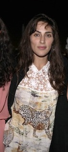 Summer Phoenix, tra la sorella Rain e la madre Heart